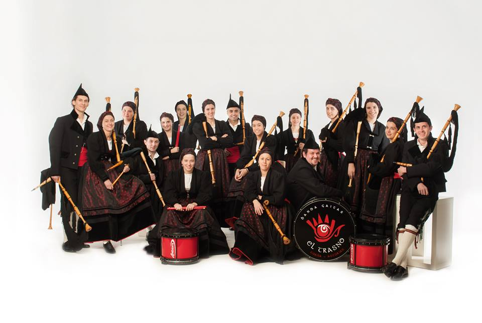 Foto d'El Trasno.